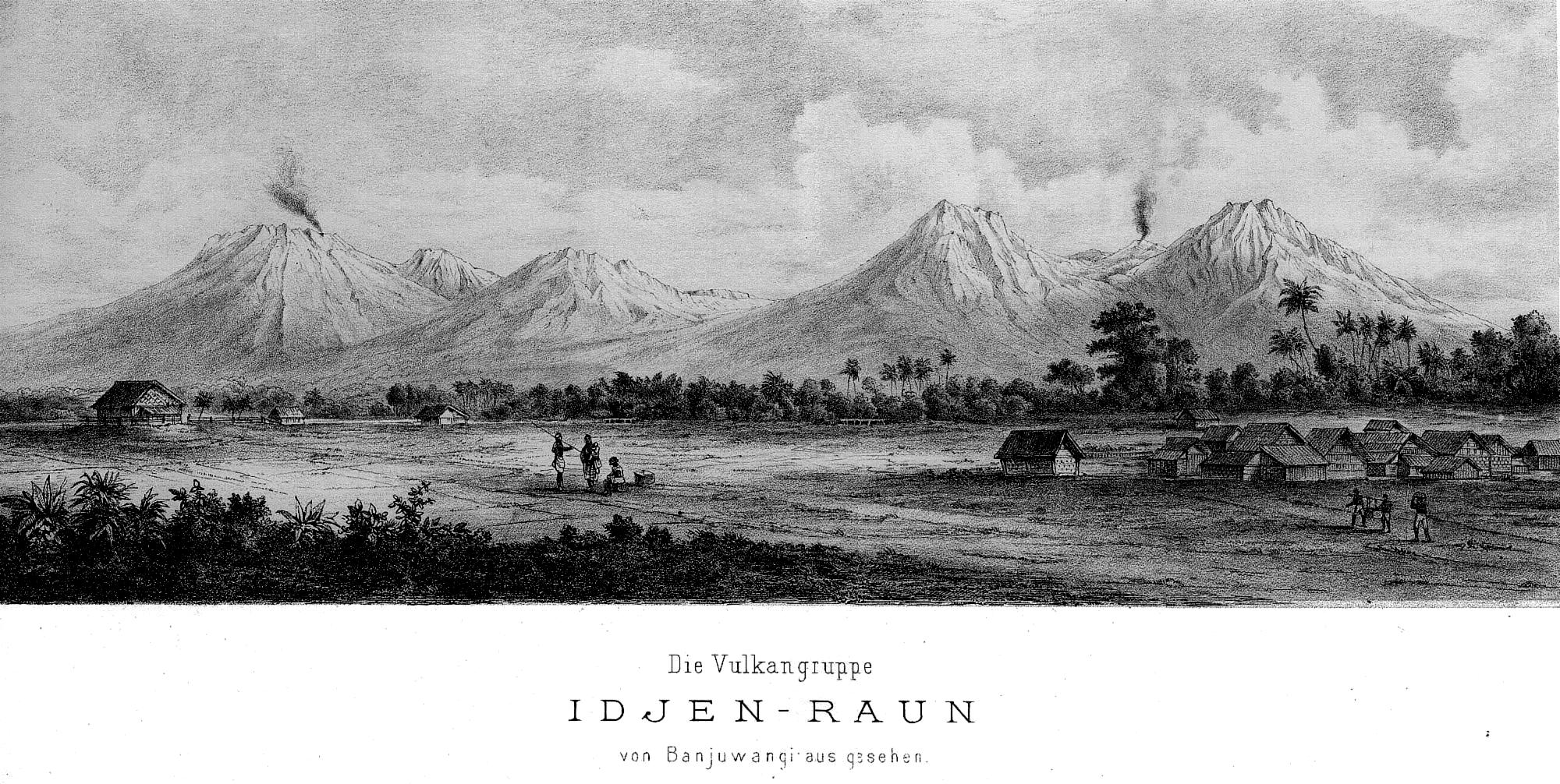 Ansicht der Vulkangruppe Ijen-Raung